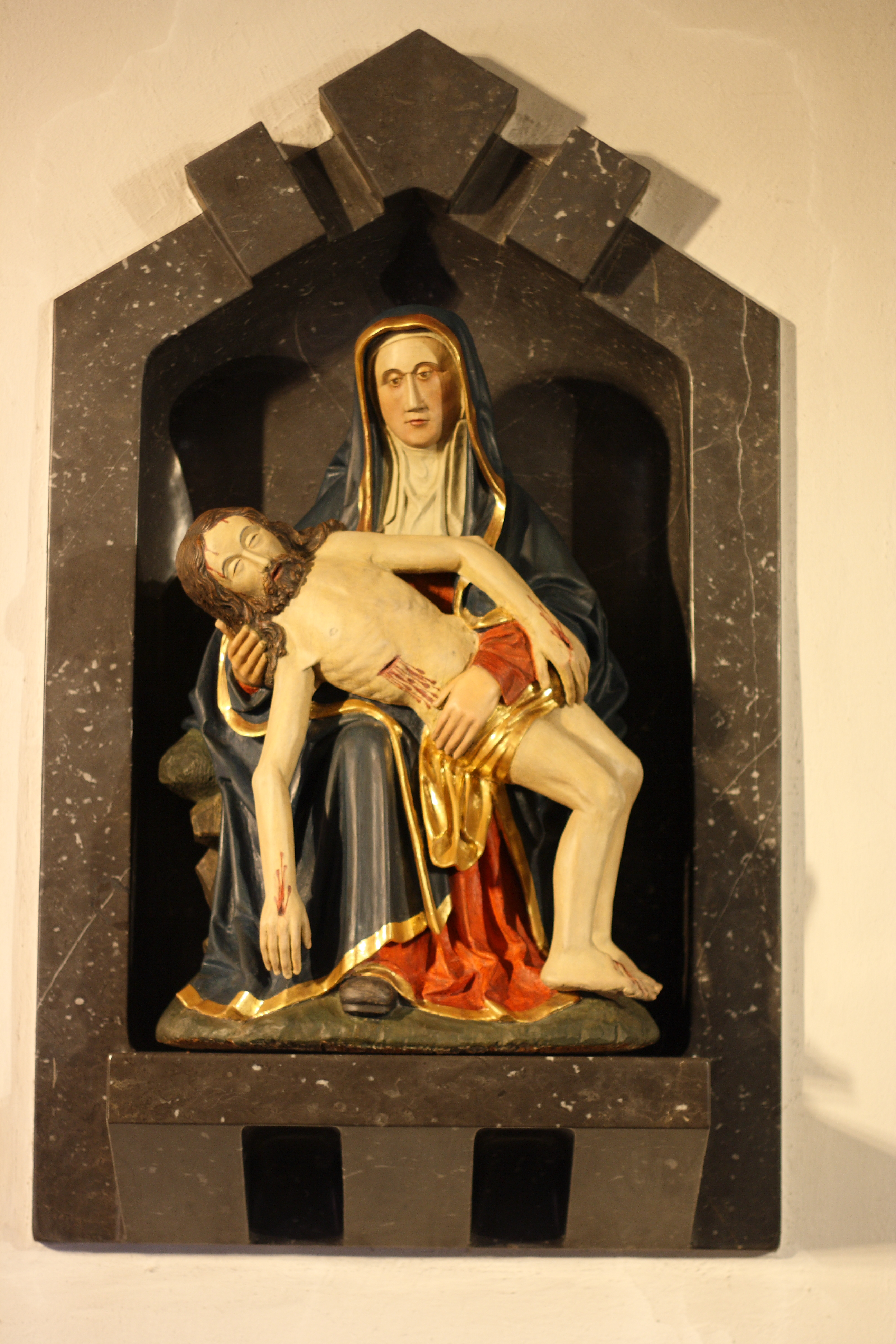 Pieta in der katholischen Pfarrkirche St. Severin in Hermülheim, einem Stadtteil von Hürth